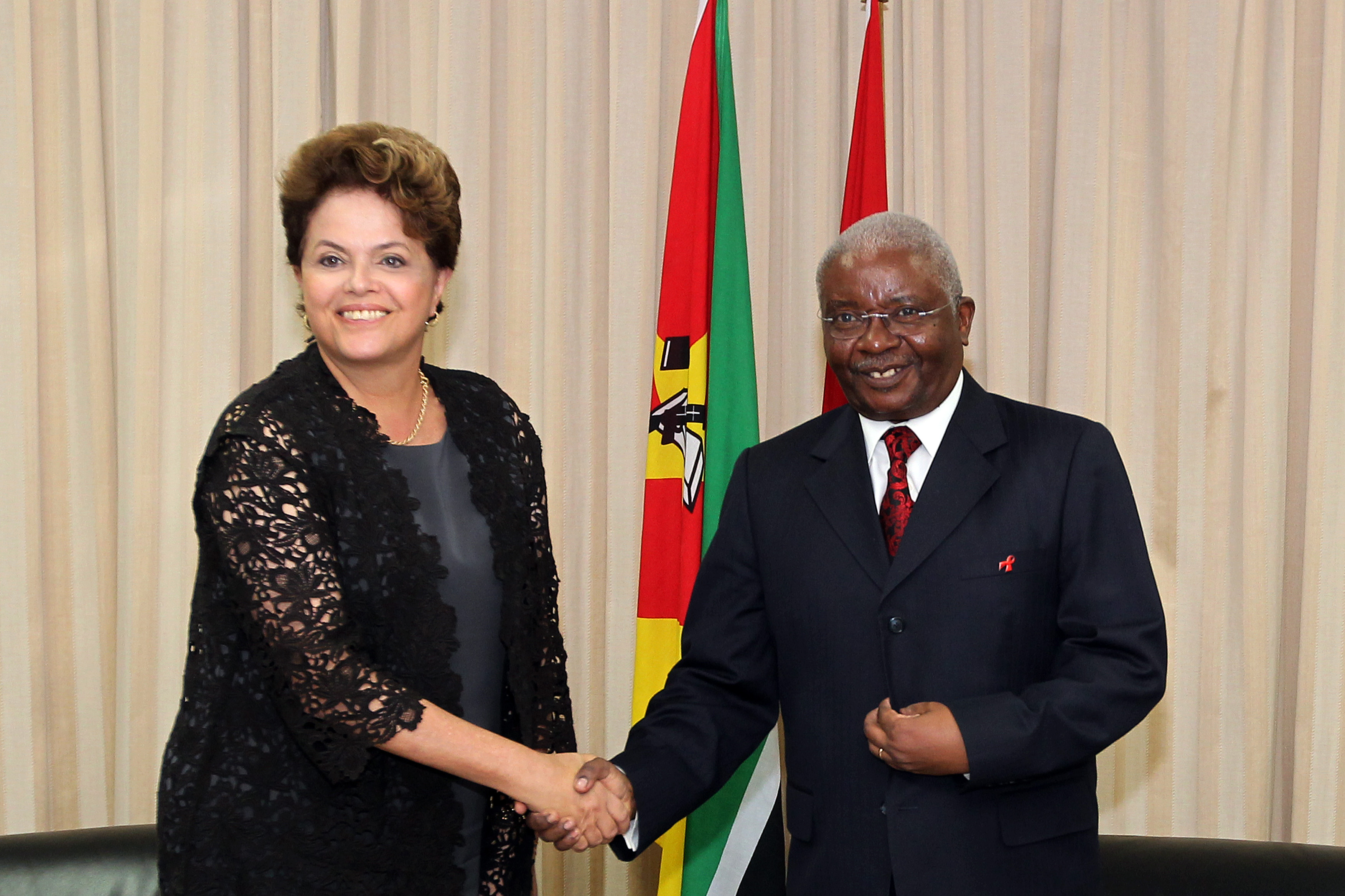 Presidenta Dilma Rousseff durante encontro com o Presidente de Moçambique, Armando Guebuza, no Palácio da Ponta Vermelha. (Maputo-Moçambique,19/10/2011)